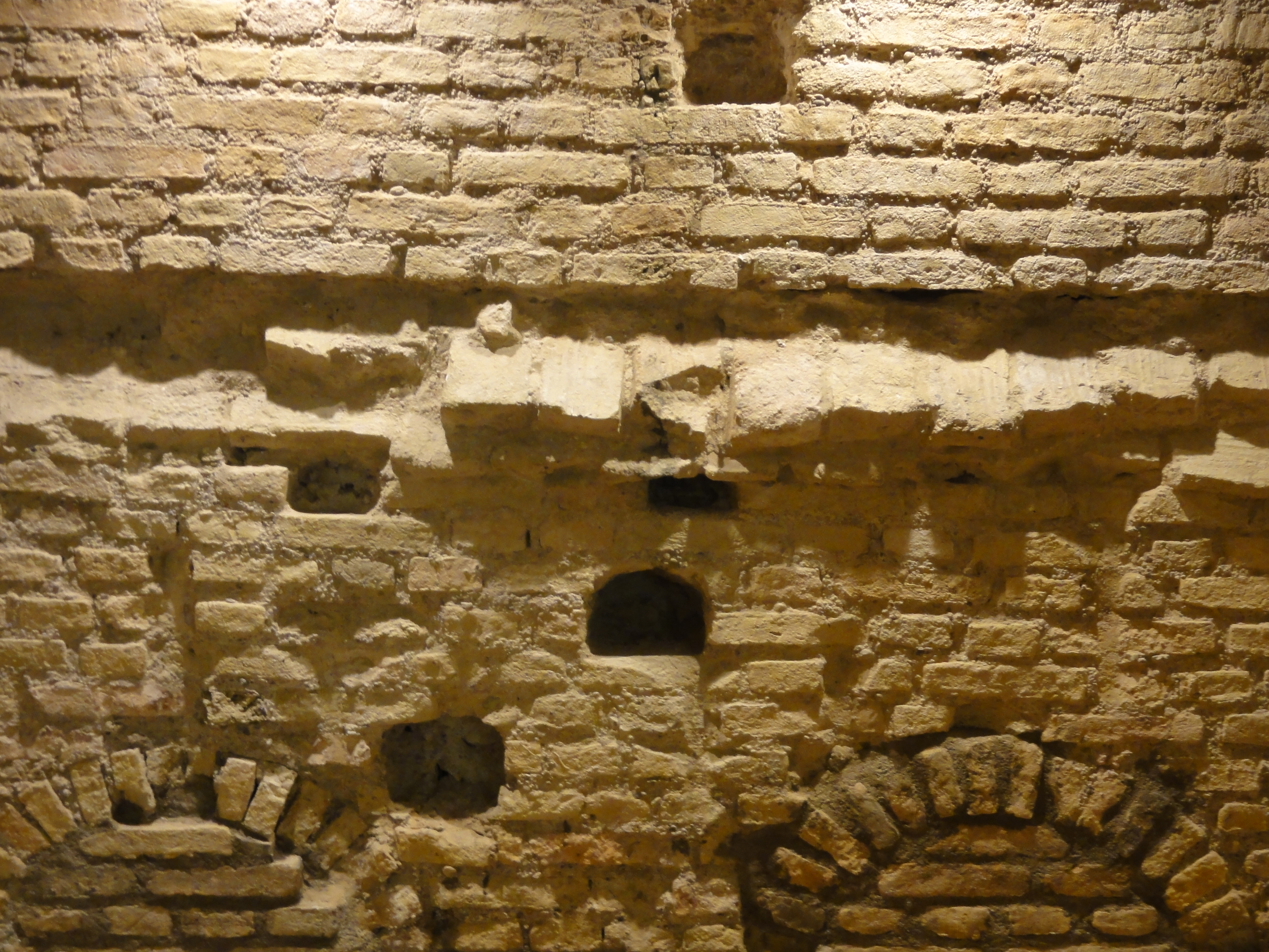 Alsace, Bas-Rhin, Strasbourg, Gymnase Jean Sturm (XIXe), 8 place des étudiants: Mur médiéval au sous-sol. Informations supplémentaires: [1]